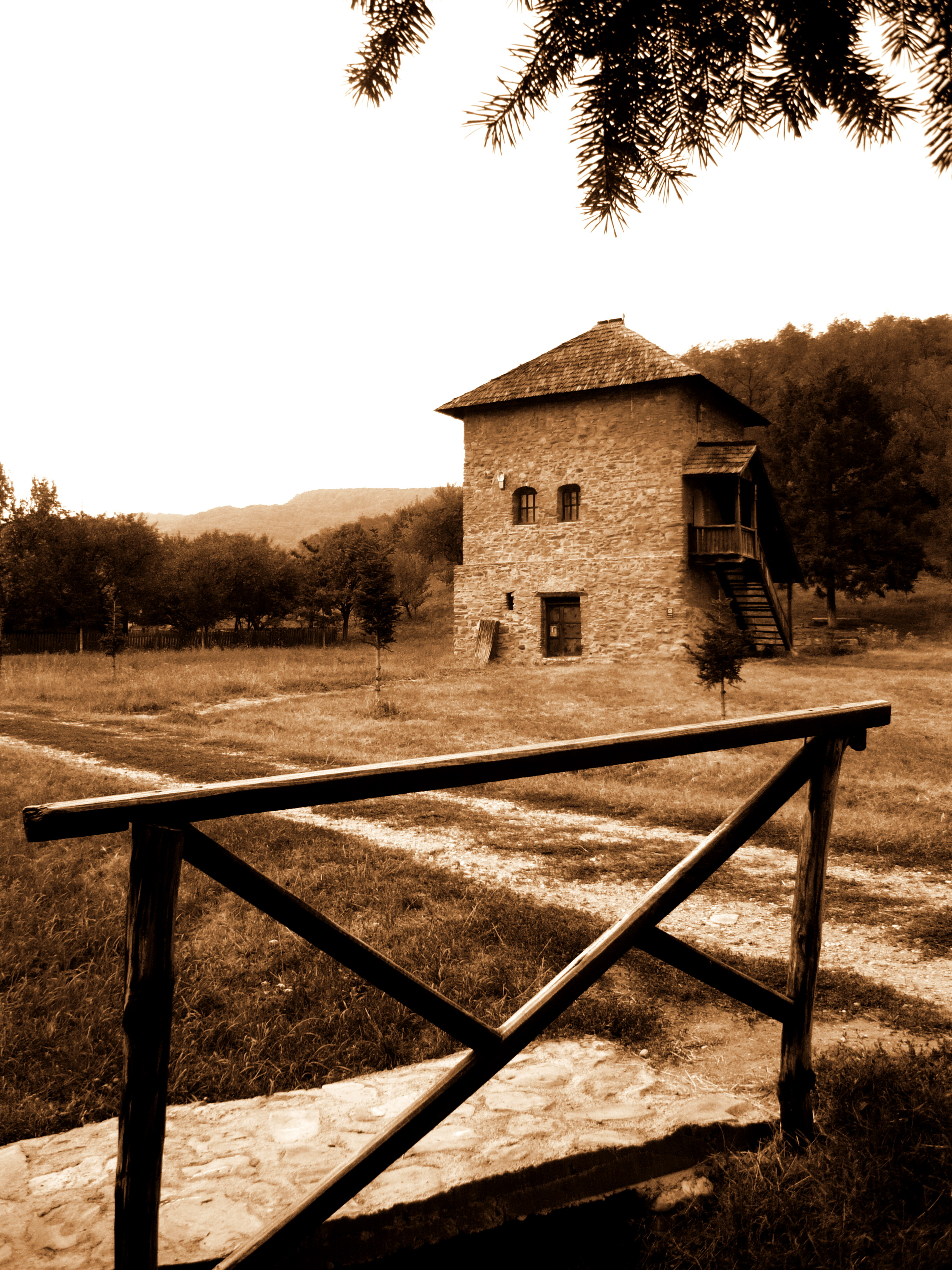 Muzeul Satului Vâlcean, Cula Bujoreanu - sat Bujoreni; comuna Bujoreni. 01